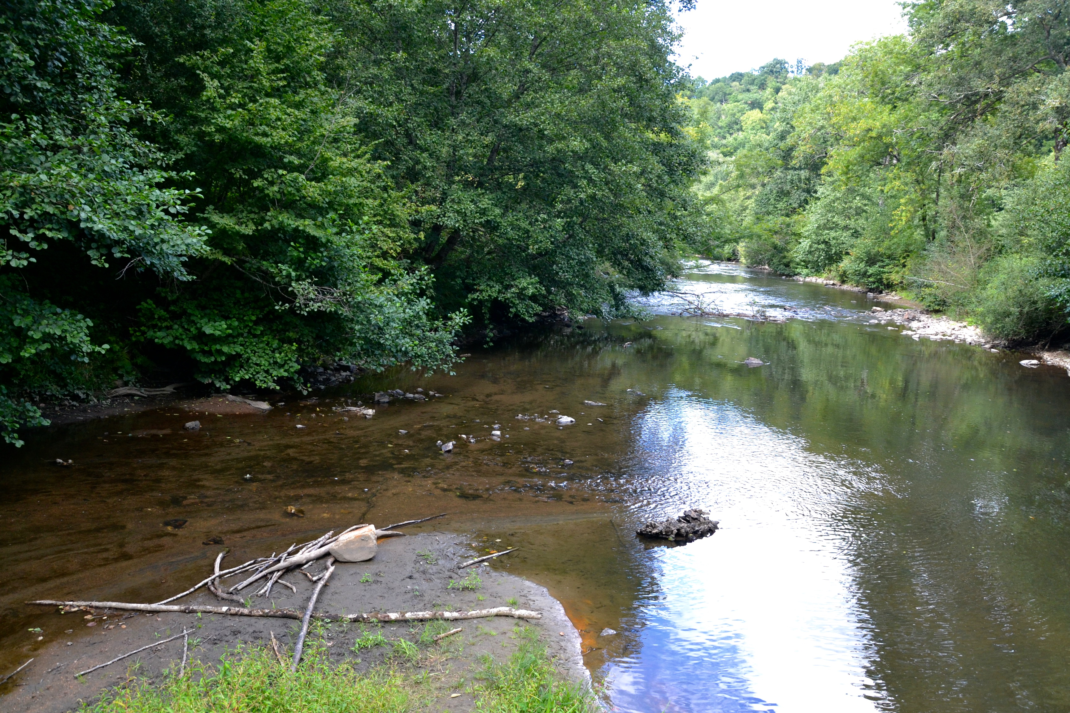 Confluence entre Ligoure (gauche) et Briance (droite), au pied du château de Chalucet. Au premier plan, commune de Saint-Jean-Ligoure. À gauche, Le Vigen, à droite, Boisseuil.